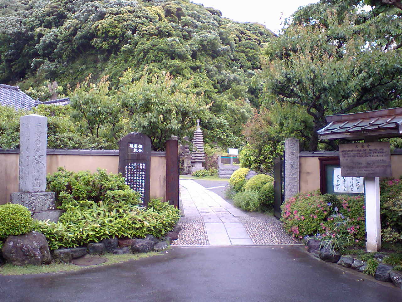 Daihoji temple Kamakura Japan